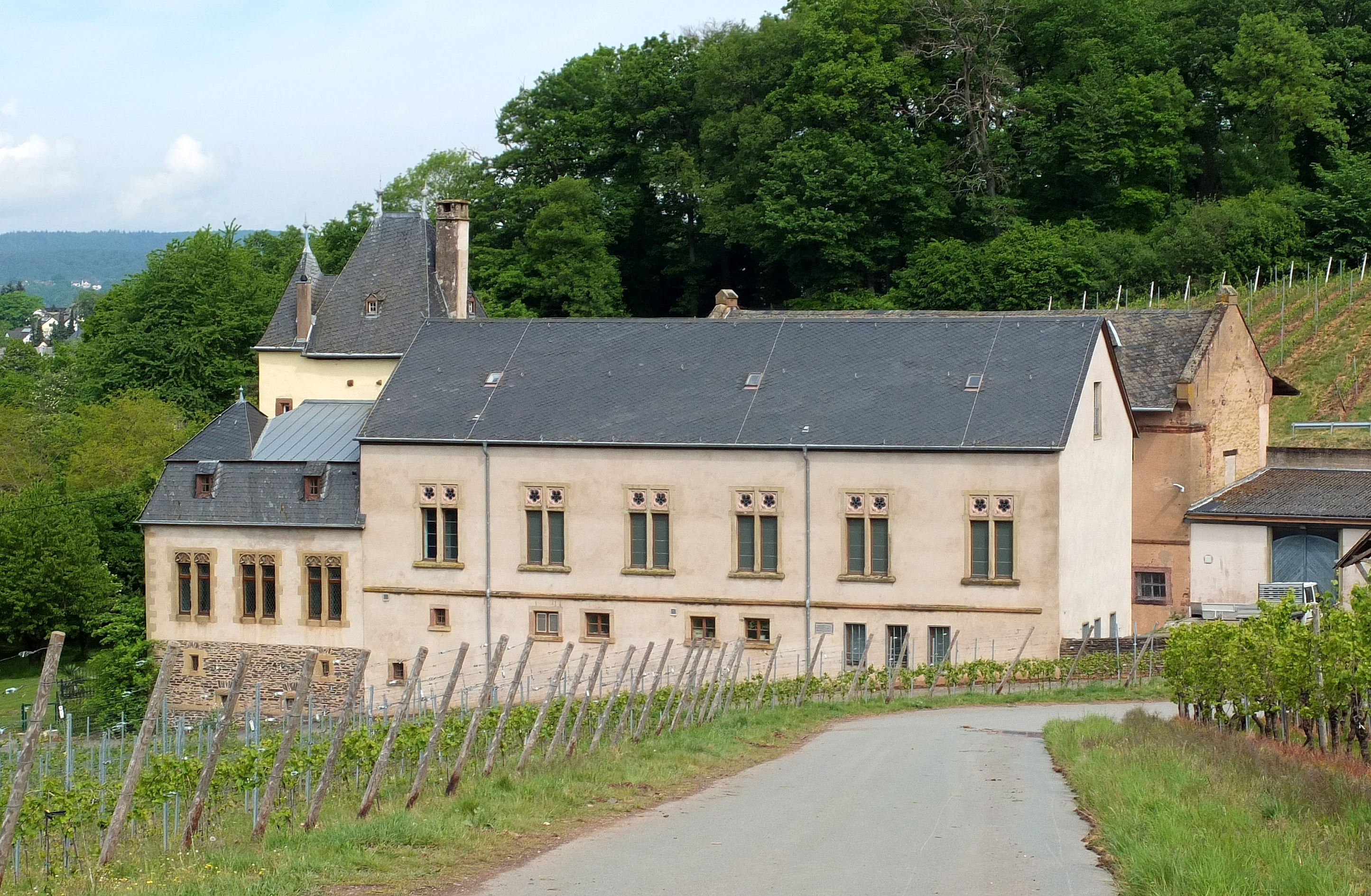 Der Duisburger Hof in Trier-Eitelsbach (Ansicht Süd). This is a photograph of an architectural monument.It is on the list of cultural monuments of Trier-Eitelsbach